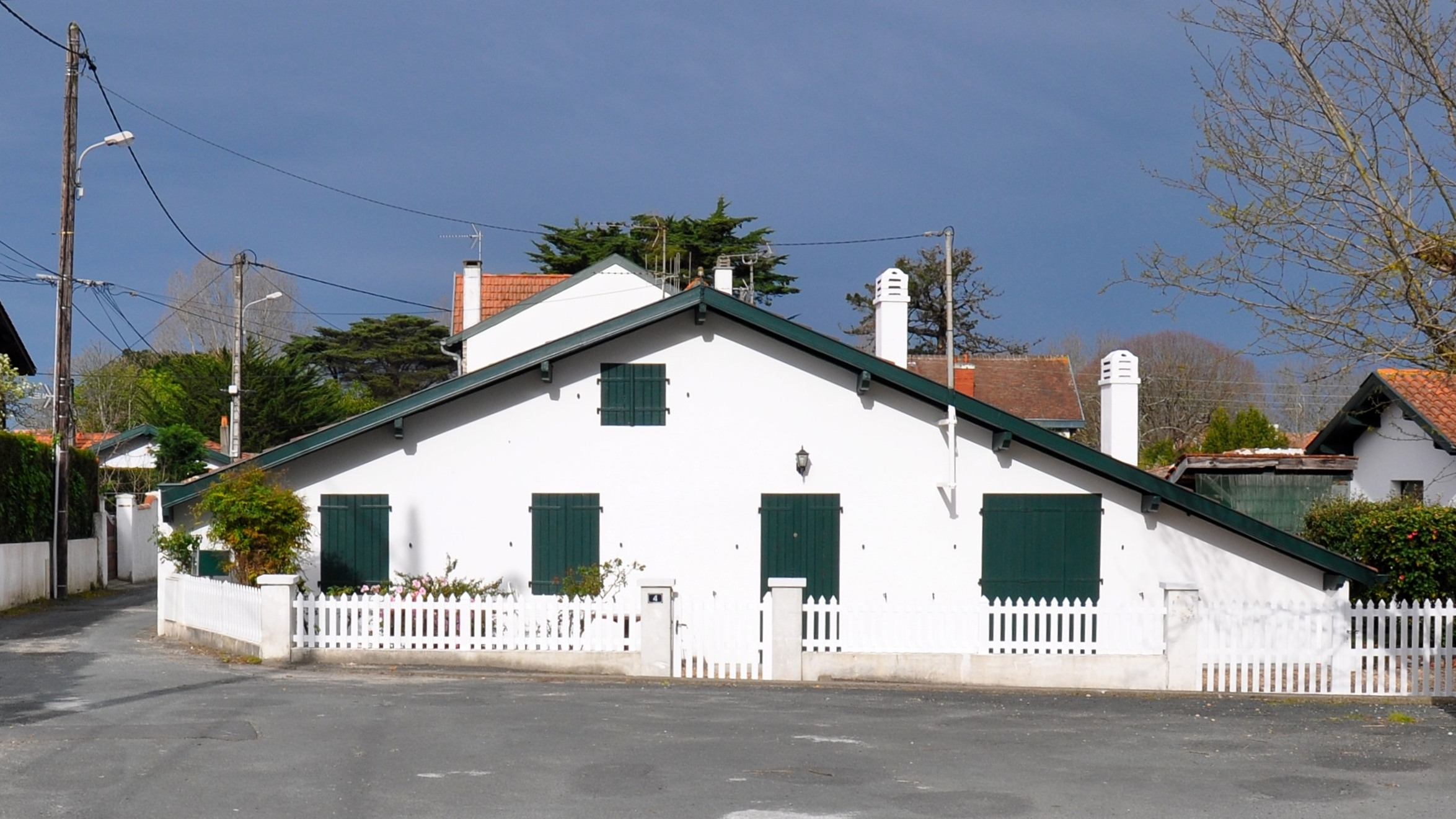 Ancienne habitation Anglet 64